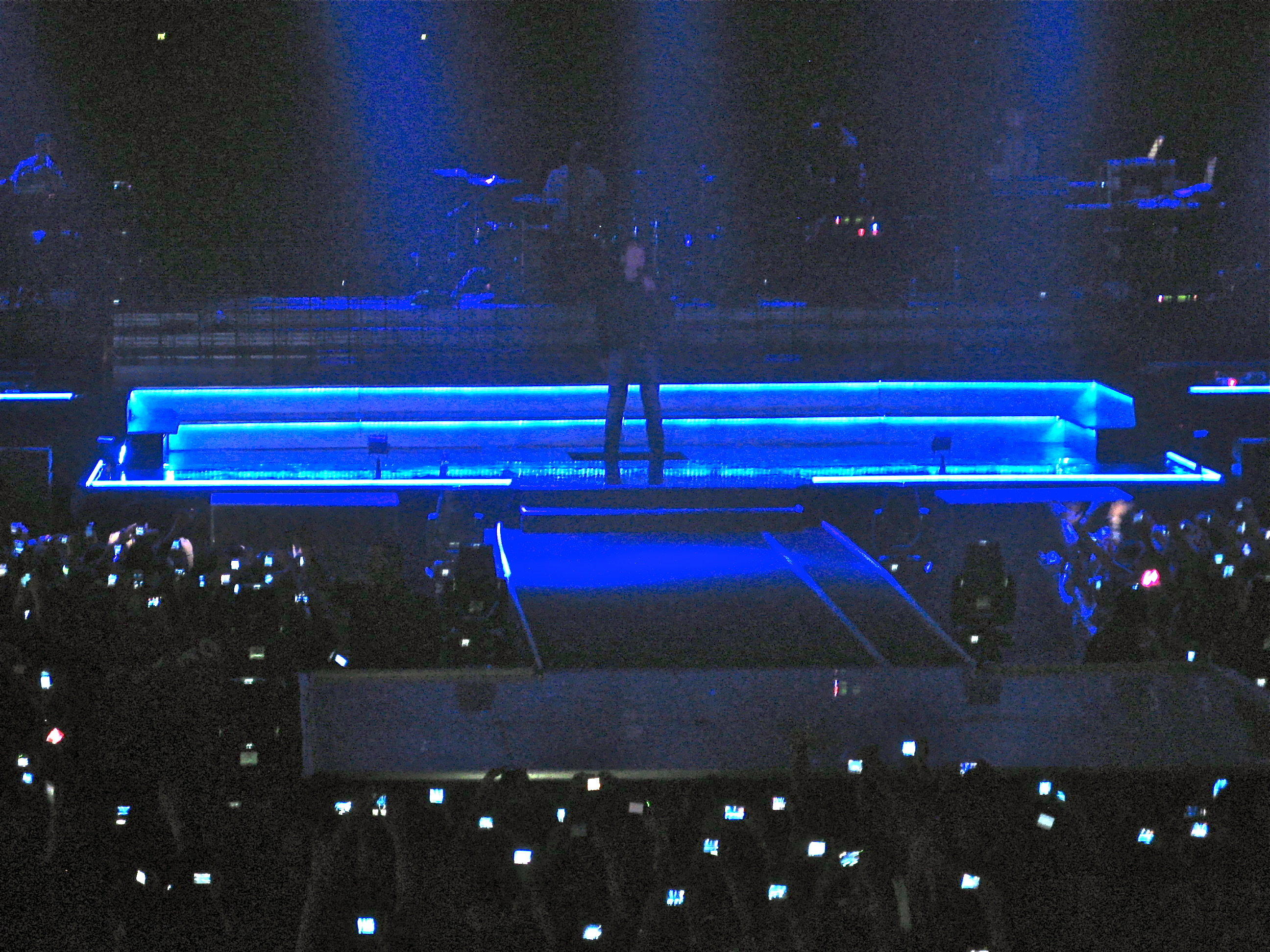 Tiziano Ferro inizia a cantare il brano L'amore è una cosa semplice al PalaVerde di Villorba.